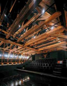 Innenraum des kleinen Theaters in Landshut